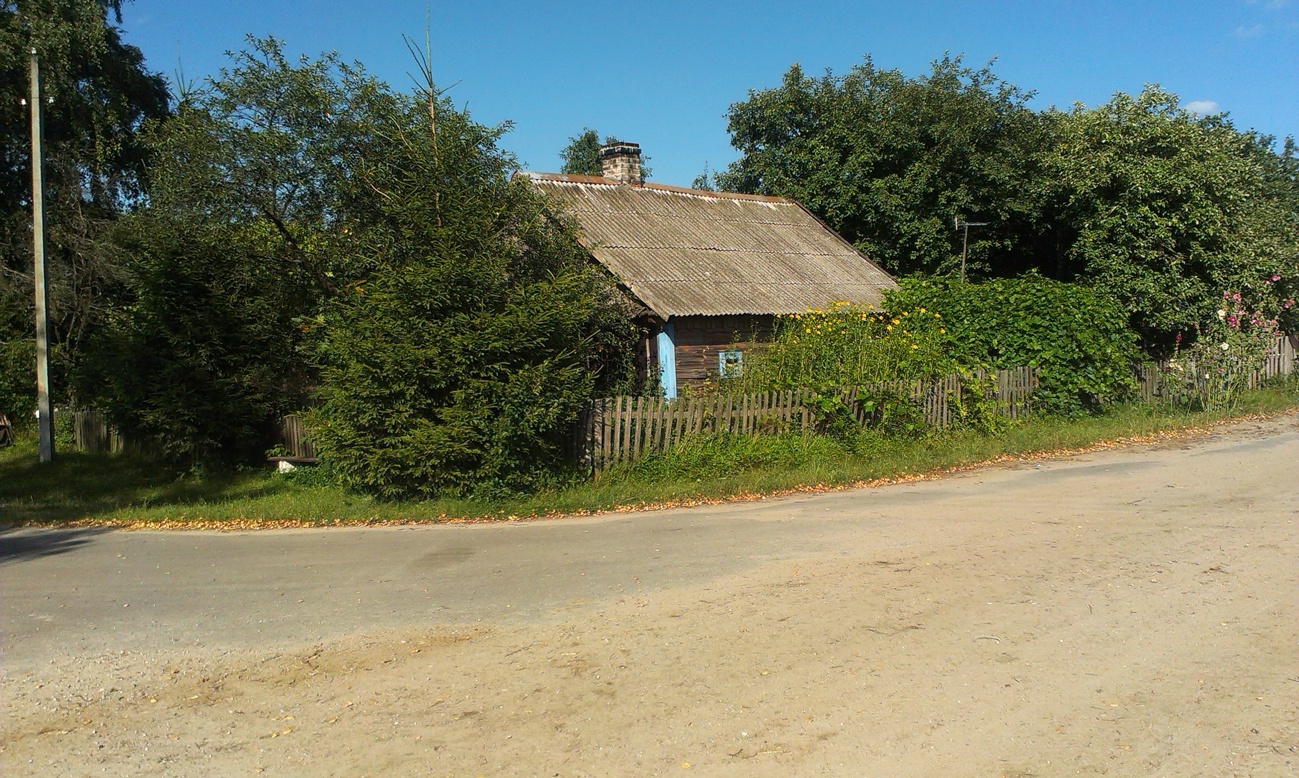 Самы заходні жылы дом Беларусі